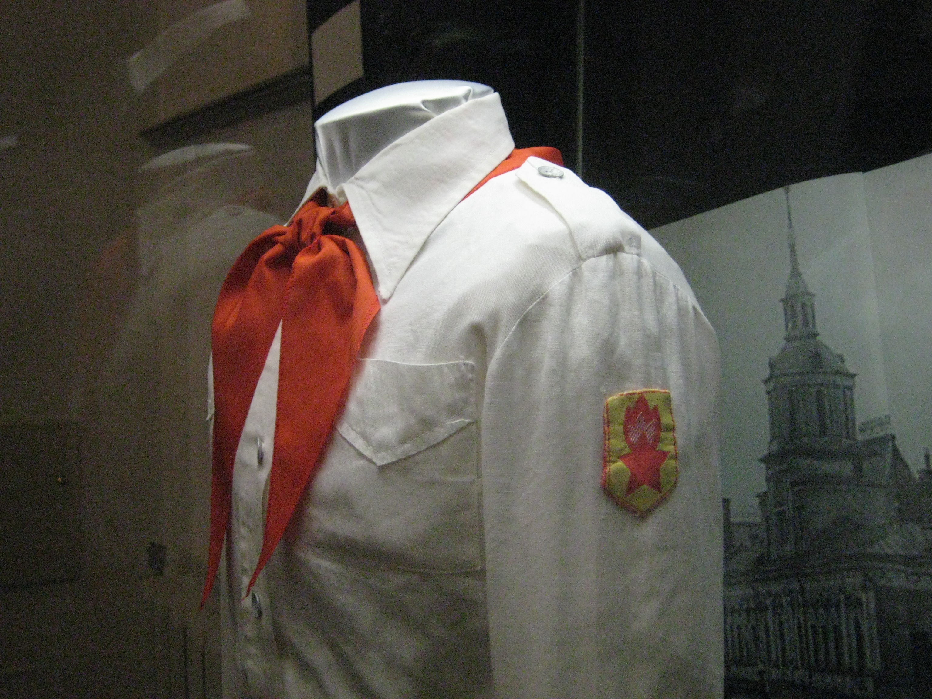 Парадная пионерская форма, 1970-е. ГИМ